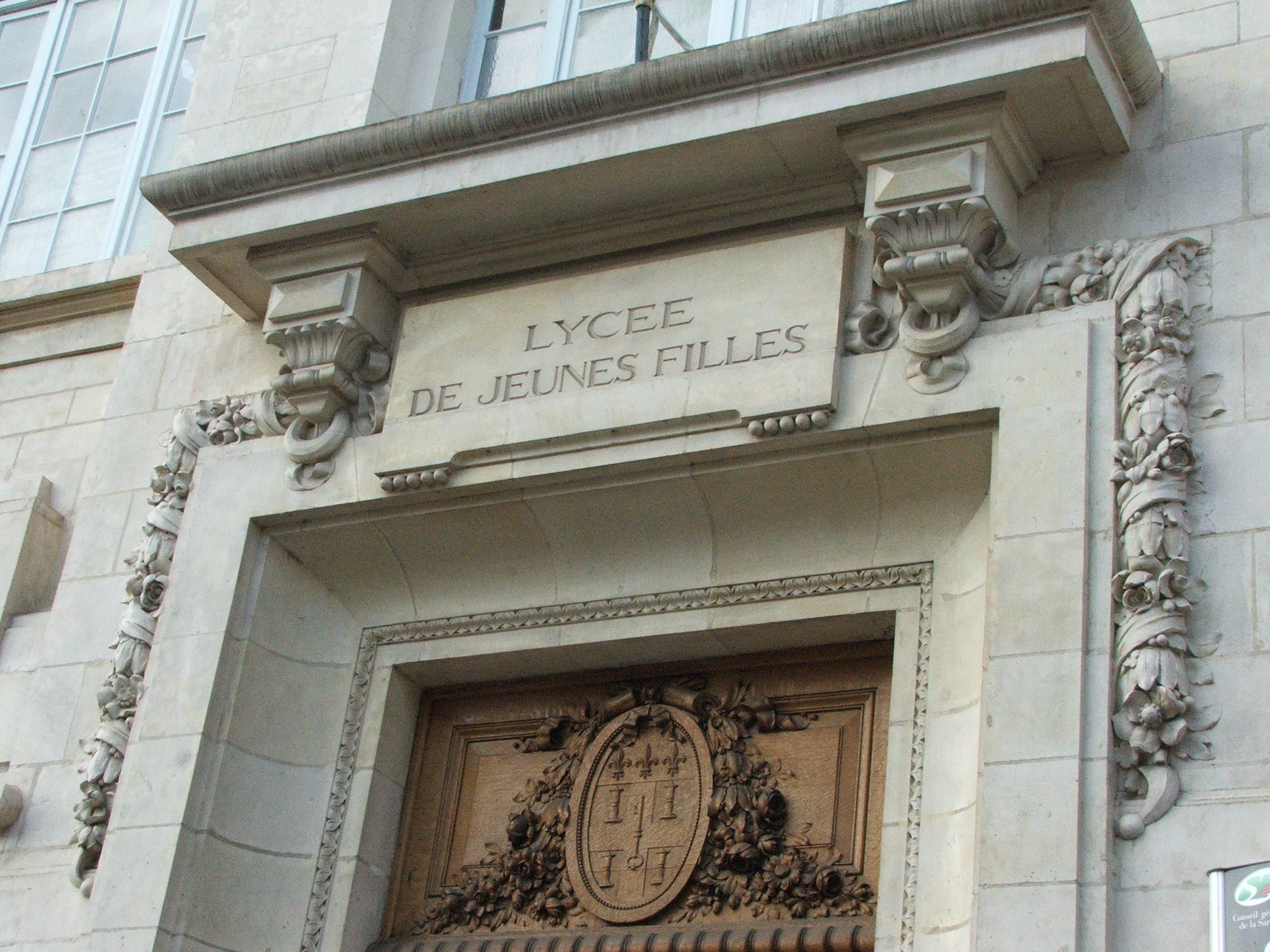 Fronton d'origine de l'ancien lycée de Jeunes filles du Mans, rue Berthelot.